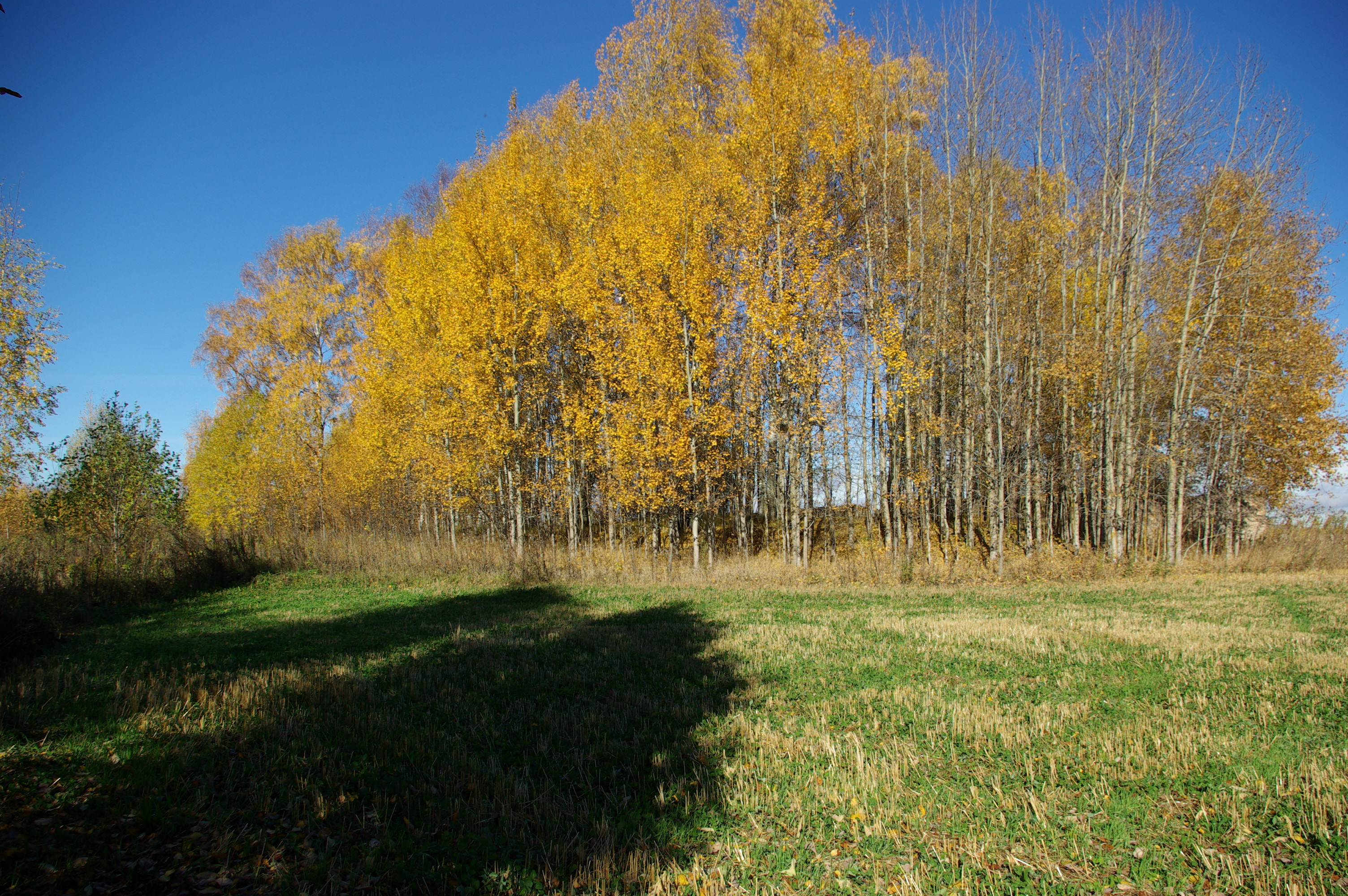 Ludimägi Uusvadas külas